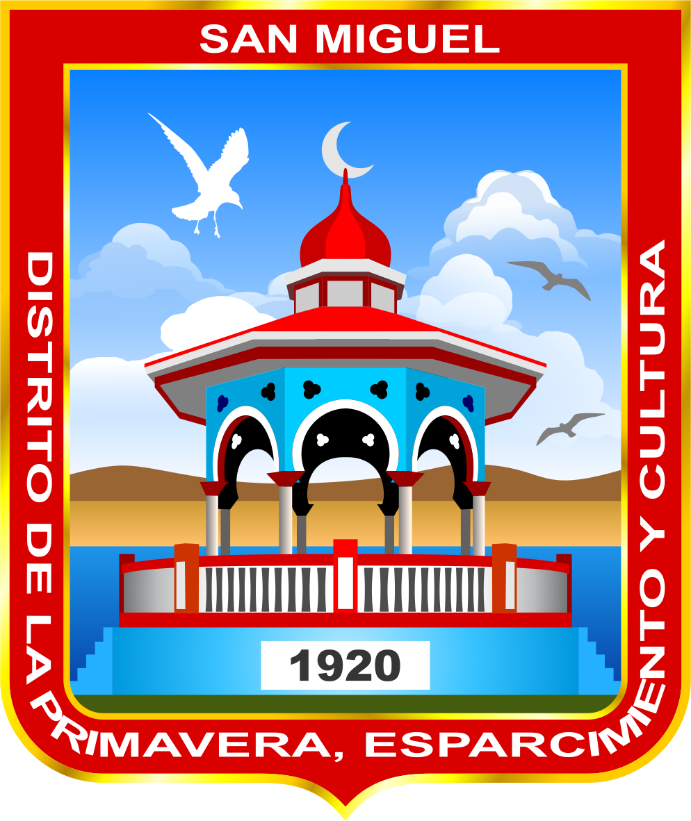 Escudo del Distrito de San Miguel - Provincia de Lima - Región Lima